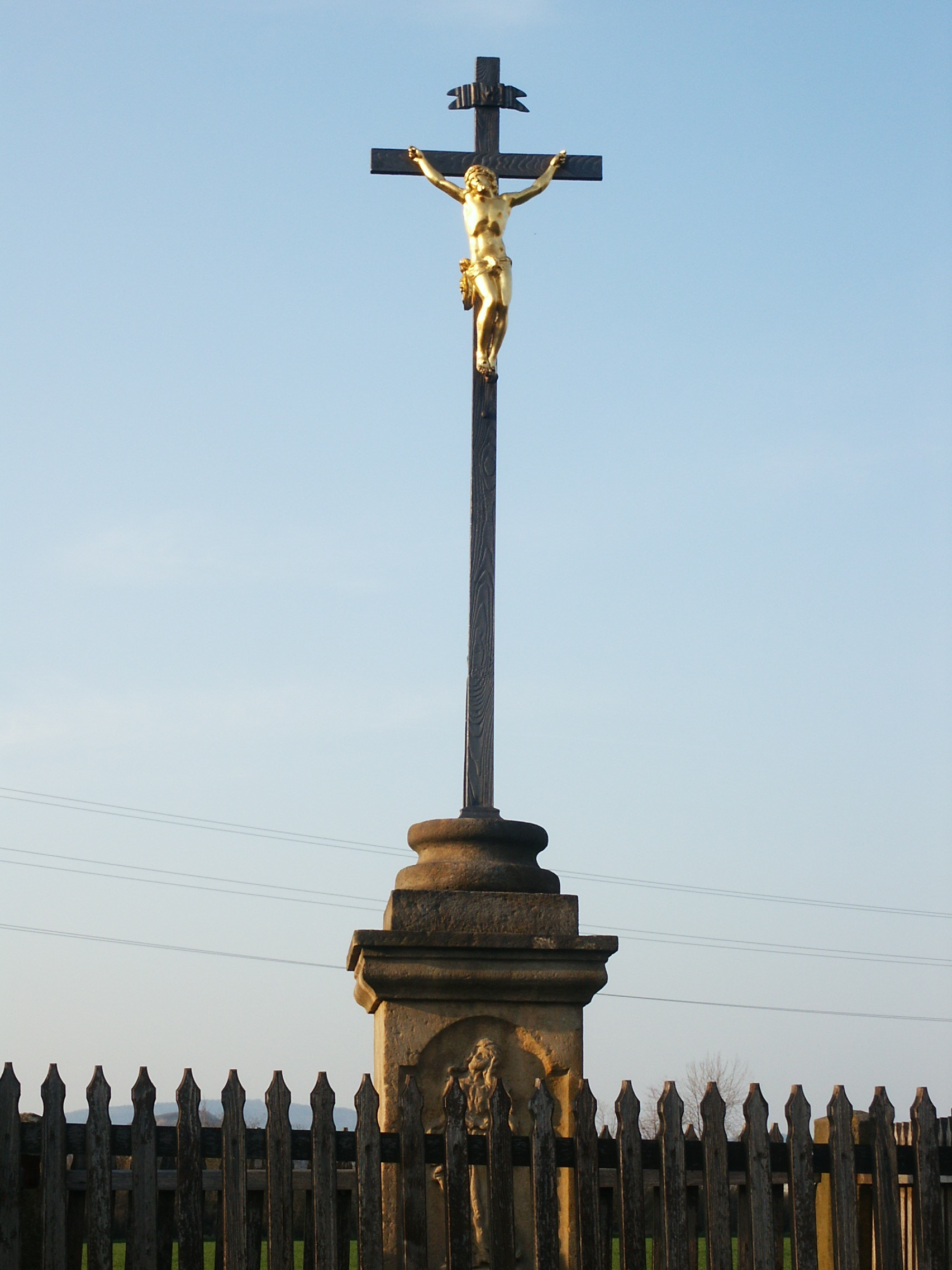 Moravčice - krucifix